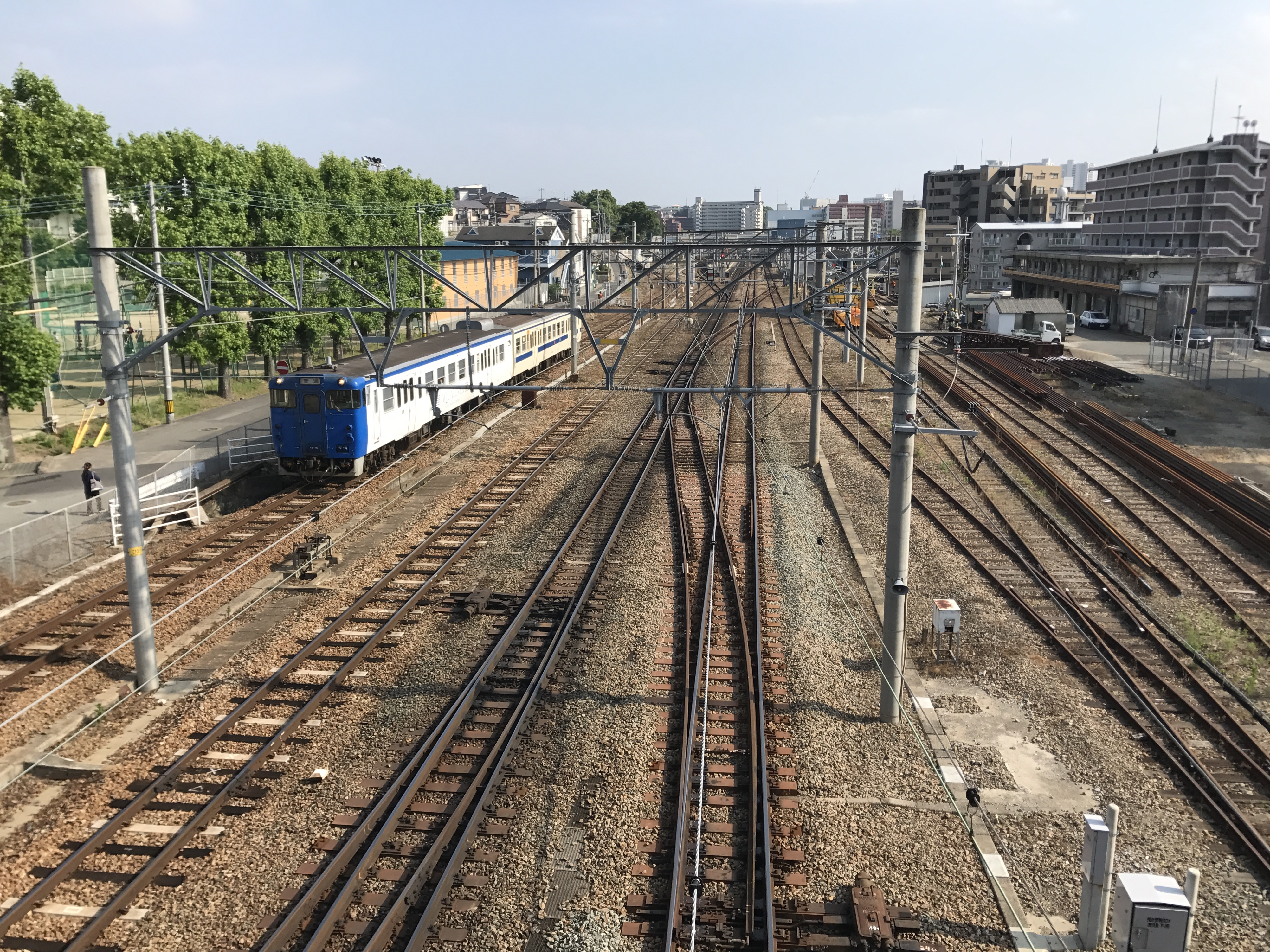 福岡県道504号の香椎側道橋より望む香椎駅方面